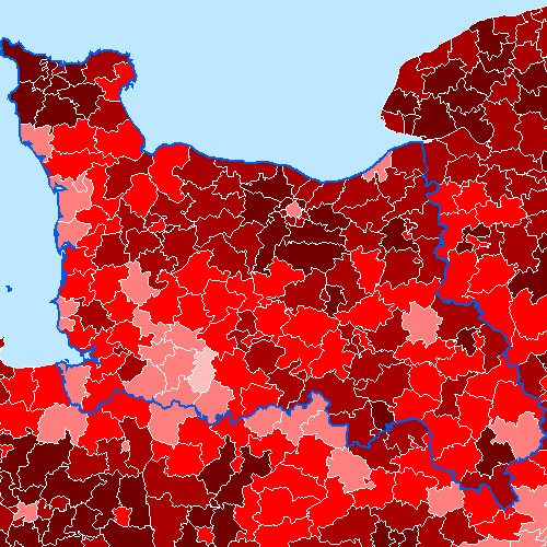 Carte de la proportion des moins de 20 ans dans la population de la région Basse-Normandie, par cantons, en 1999. Légende : Image:-20ans1999-canton legende.jpg Cette carte est généreusement fournie par l'IAAT (Institut atlantique d'aménagement du territoire) Original: Je la place comme convenu avec eux sous licence GFDL Utilisateur:Archeos Catégorie:Carte démographique